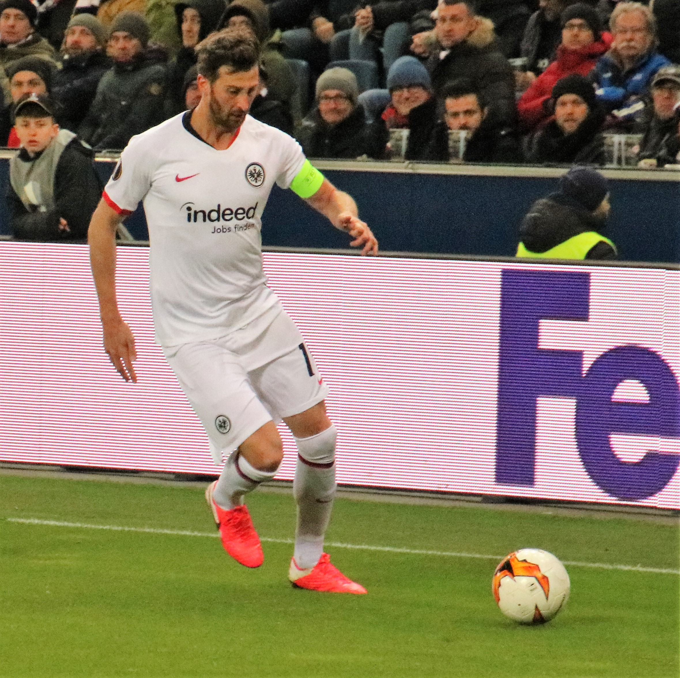 EL Sechzehntelfinale Rückspiel 2:2